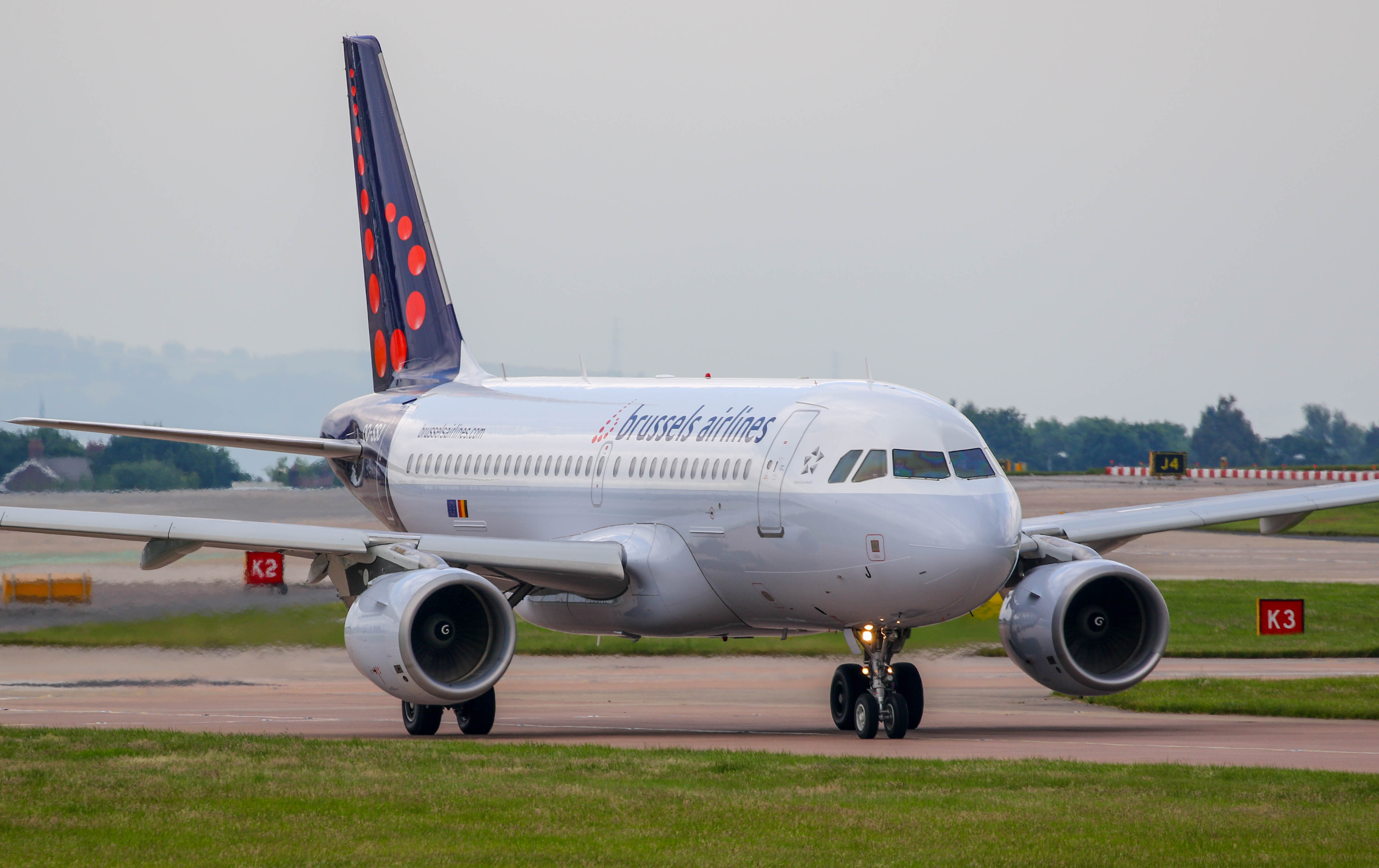 Brussels Airlines A320